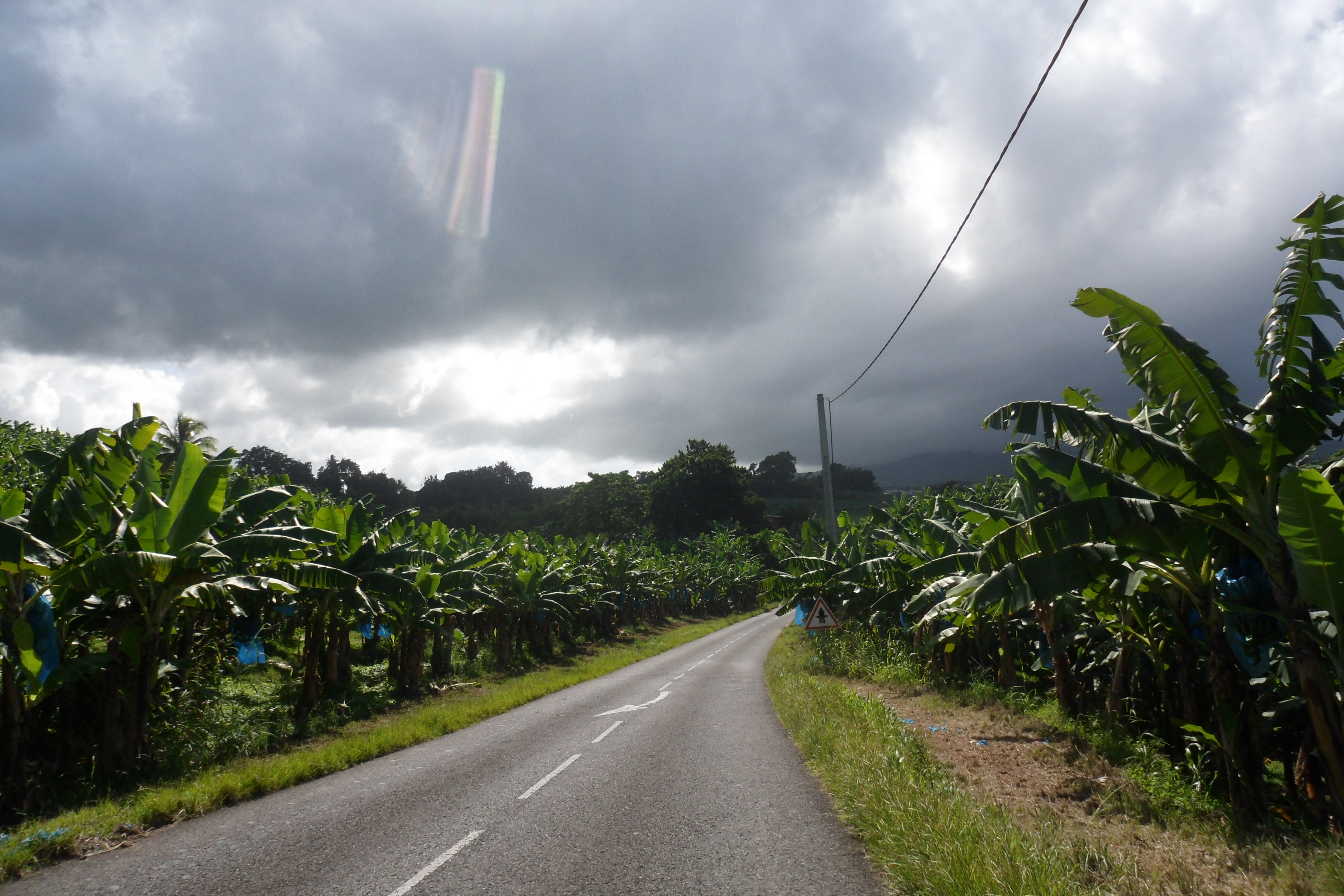 Route Départementale D22 au Lorrain, en Martinique.